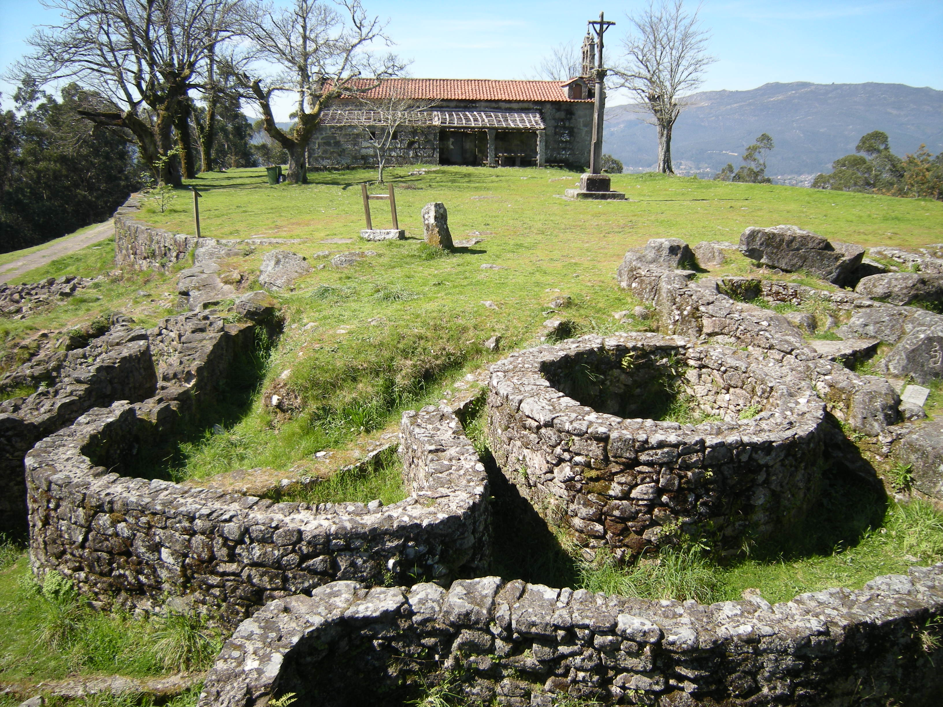 Esta foto participó en el juego En otro lugar de Flickr. Escucha a Xosé Manuel Budiño - Galo Galán en Goear.